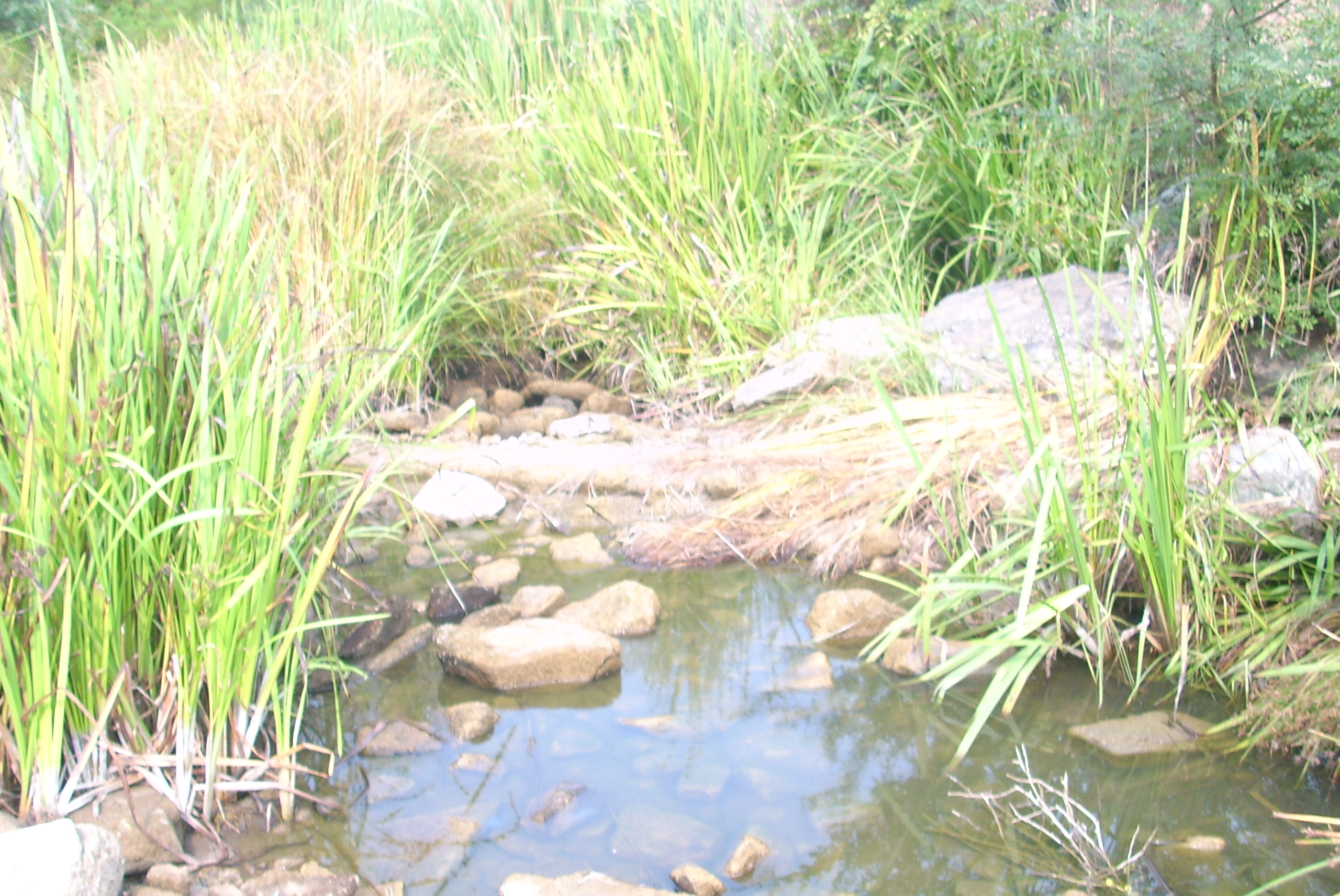 с.Бистрец-река Средецка